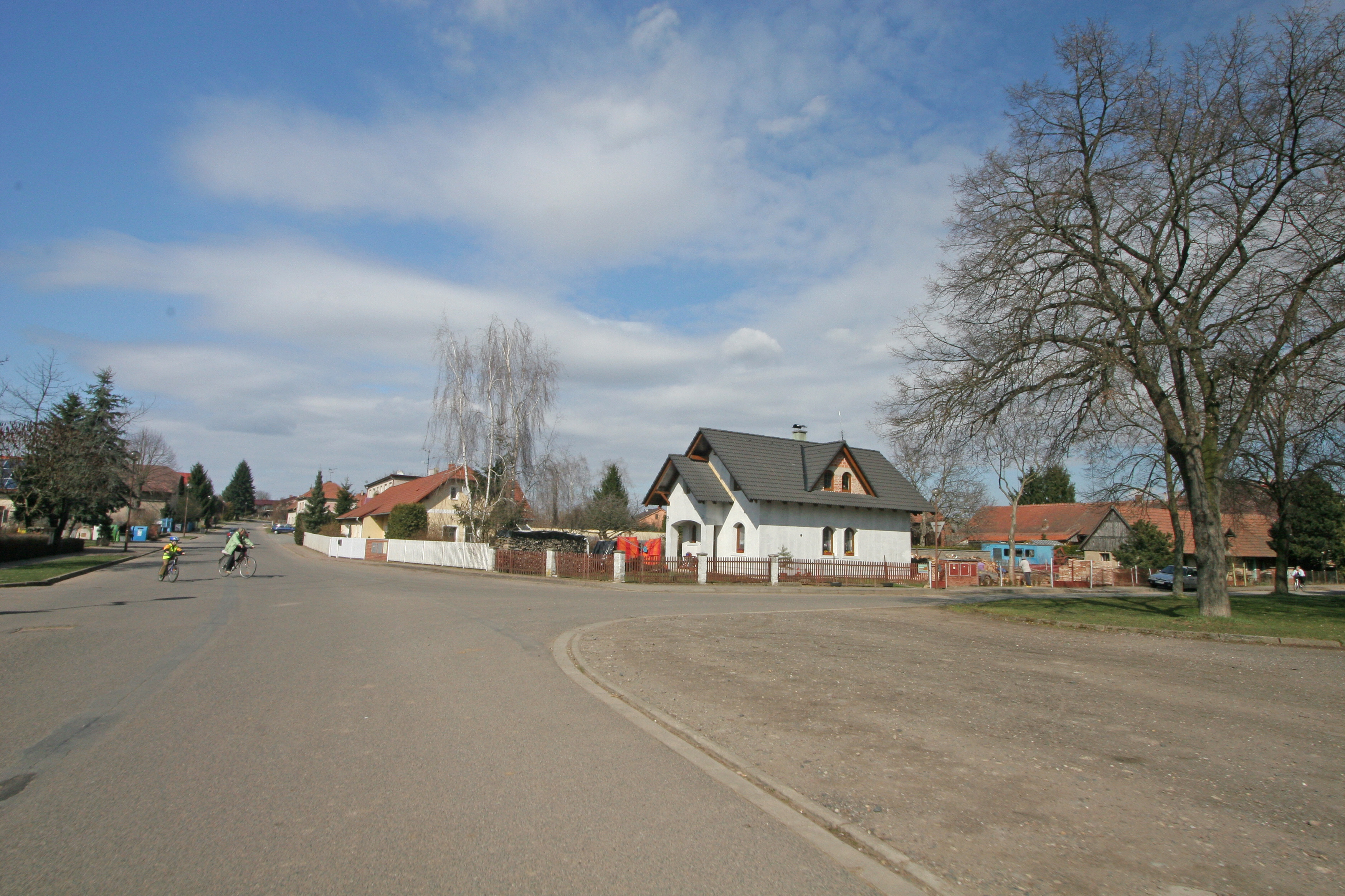 kosice